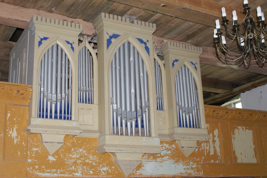 Świelino, organy w kościele filialnym p.w. św. Piotra i Pawła